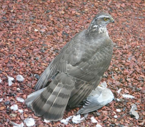 Een sperwer eet een duifje op de garageoprit te De Klinge, België